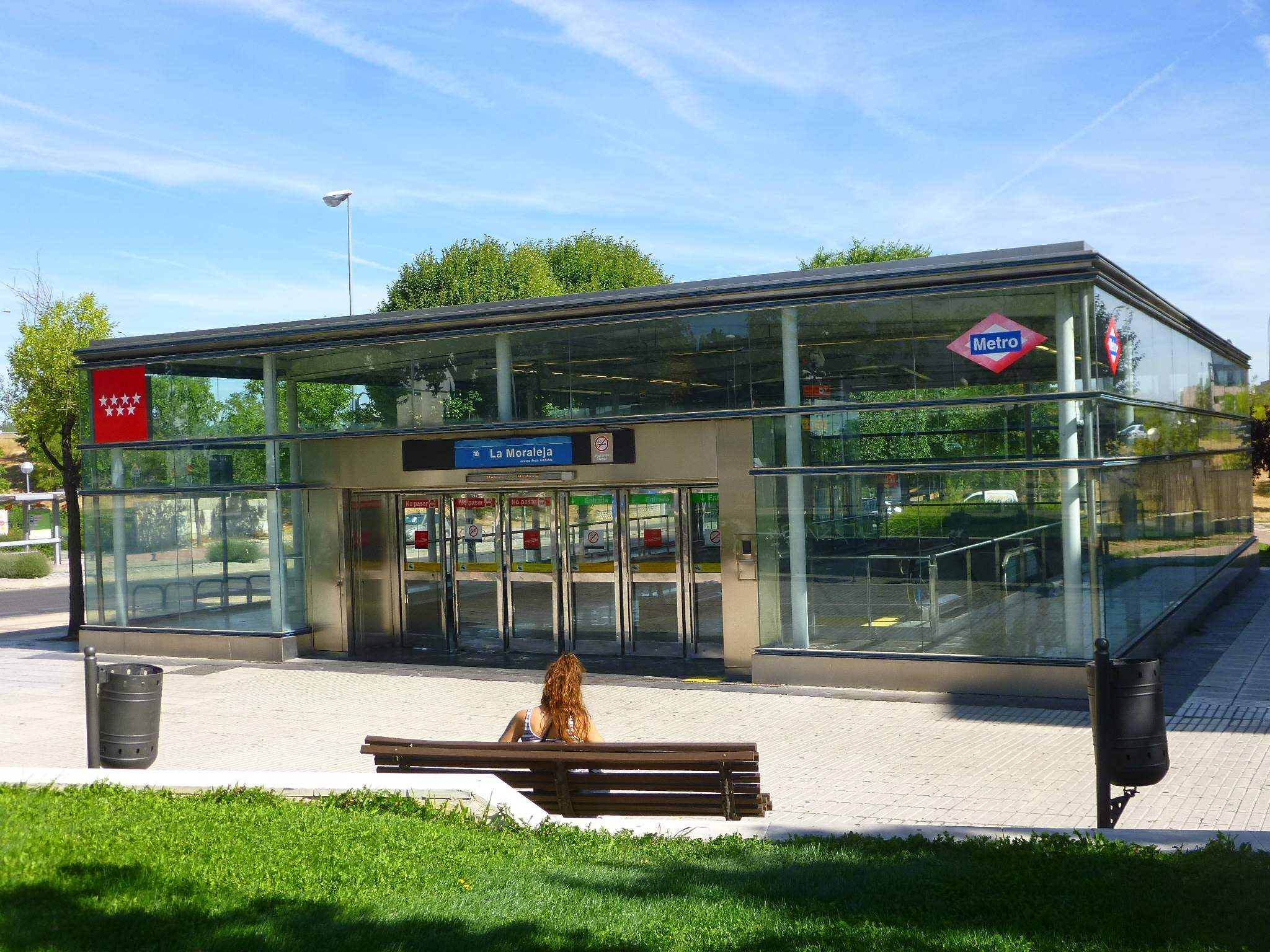 Alcobendas - Estación de La Moraleja